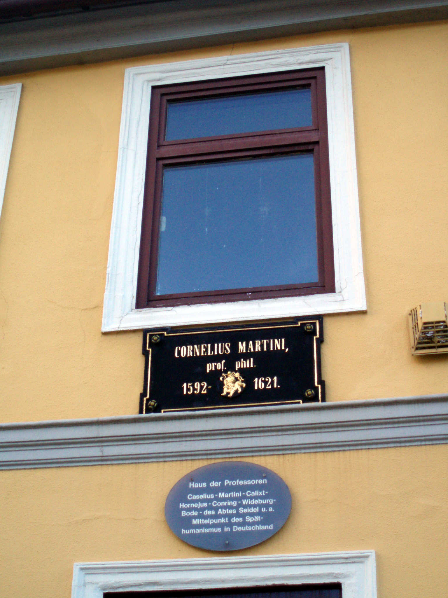 Cornelius-Martini-Tafel in Helmstedt